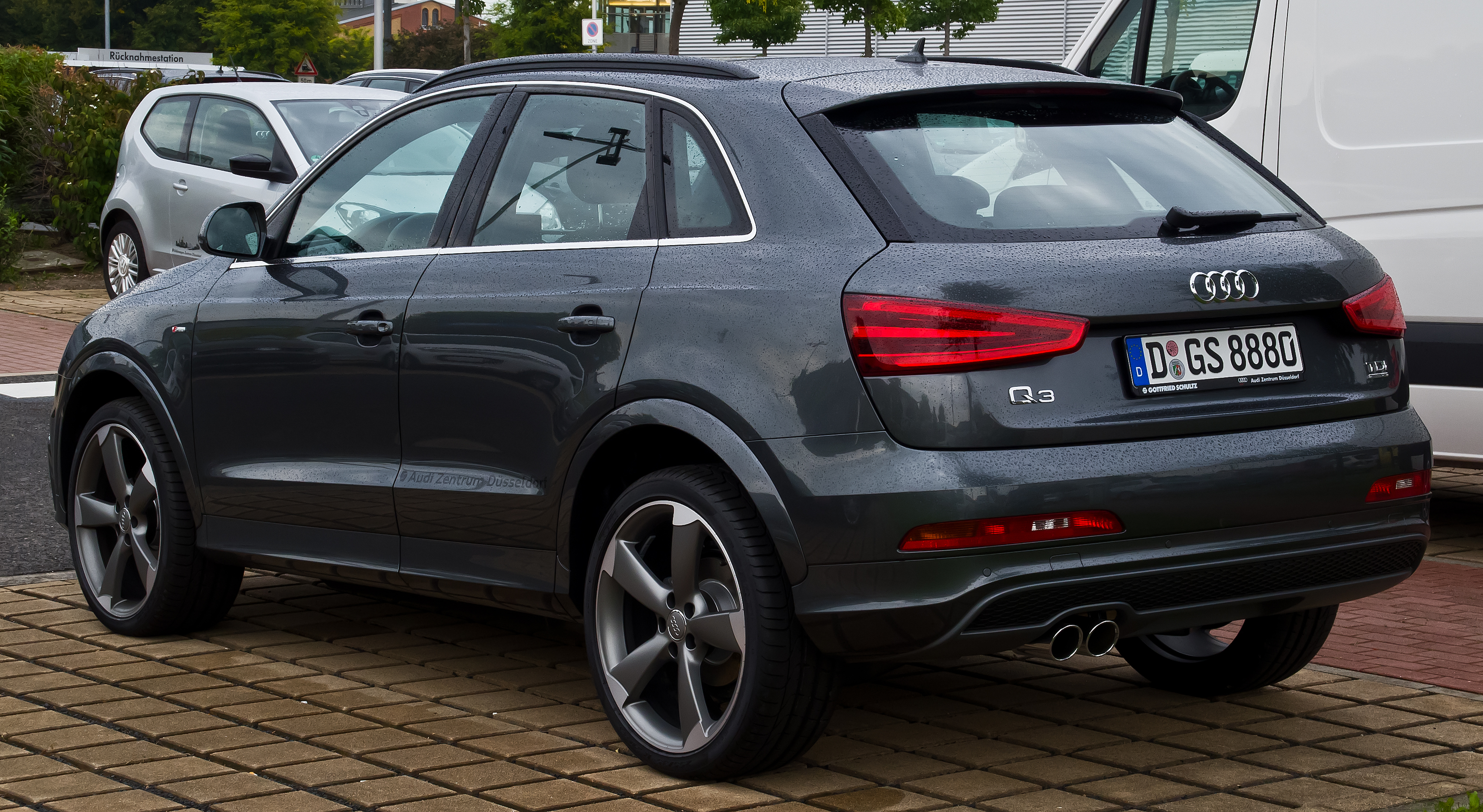 Audi Q3 2.0 TDI quattro S-line